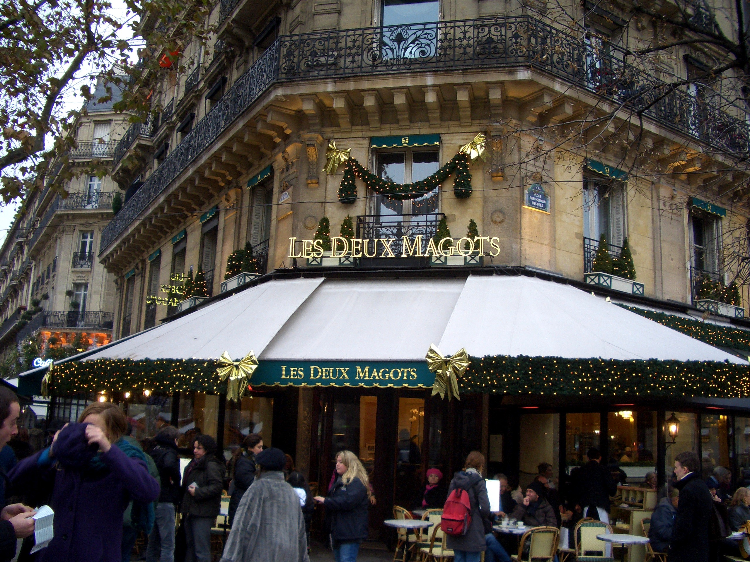 Il Caffè "Les Deux Magots" a Saint-Germain-des-Prés (Parigi) meta abituale di scrittori famosi come J. P. Sartre, Simone de Beauvoir, Hemingway ecc. Foto scattata da me a Parigi il 31.12.09